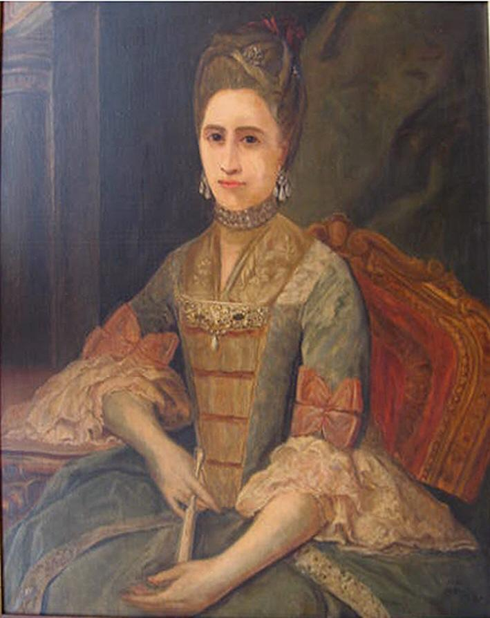 Retrato de Josefa de Jovellanos (1745-1807), que era apodada la Argandona y fue hermana del politico e ilustrado español Gaspar Melchor de Jovellanos (1744-1811). Este retrato es una copia del que pinto Joaquín Inza de la misma dama antes de 1774.